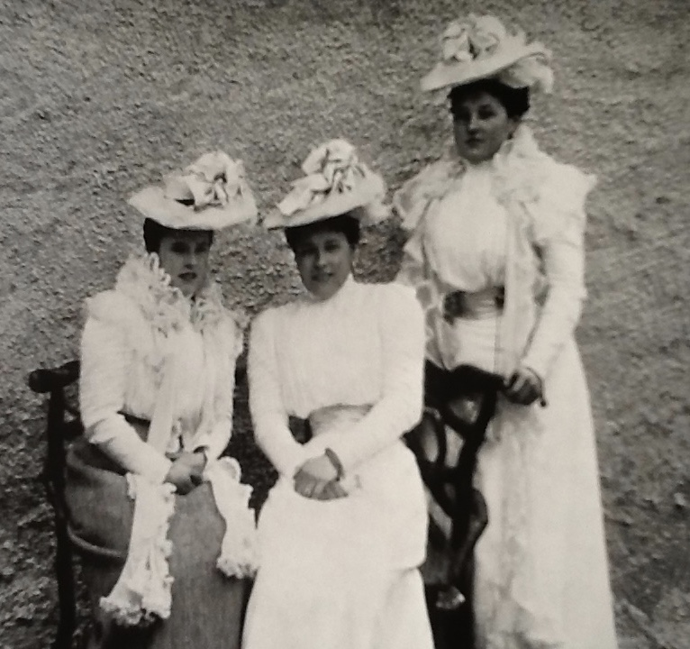 v.l.n.r.: Maria Christina (1879-1962), Maria-Anna (1882-1940), Henriette (1883-1956), Foto etwa 1900-1905 (